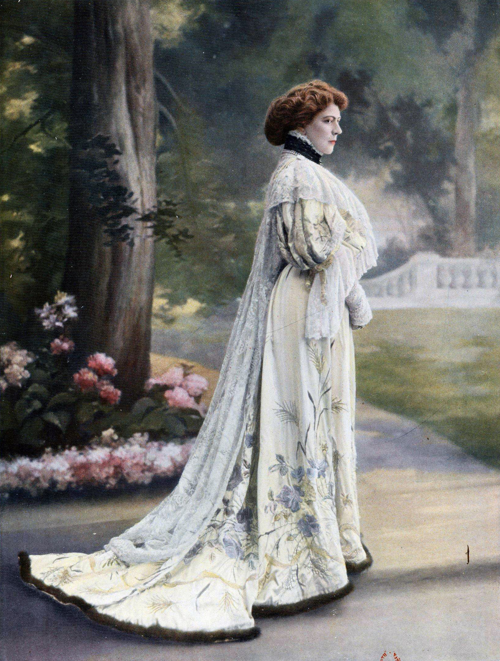 Toilette créée par Redfern pour les représentations de Serge Panine de Georges Ohnet au théâtre de la Gaîté. Photograph in Les Modes : Revue mensuelle illustrée des arts décoratifs appliqués à la femme.